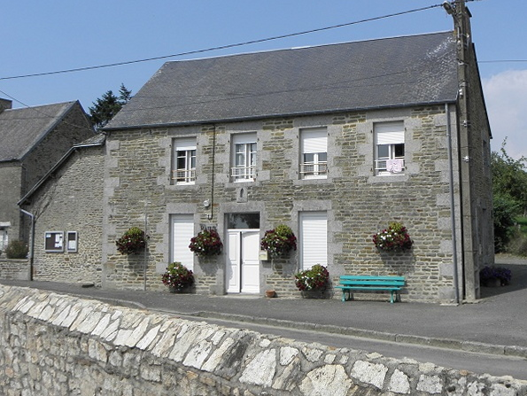 Mairie de Cormeray (50), commune associée à celle de Pontorson depuis le 1er janvier 1973.